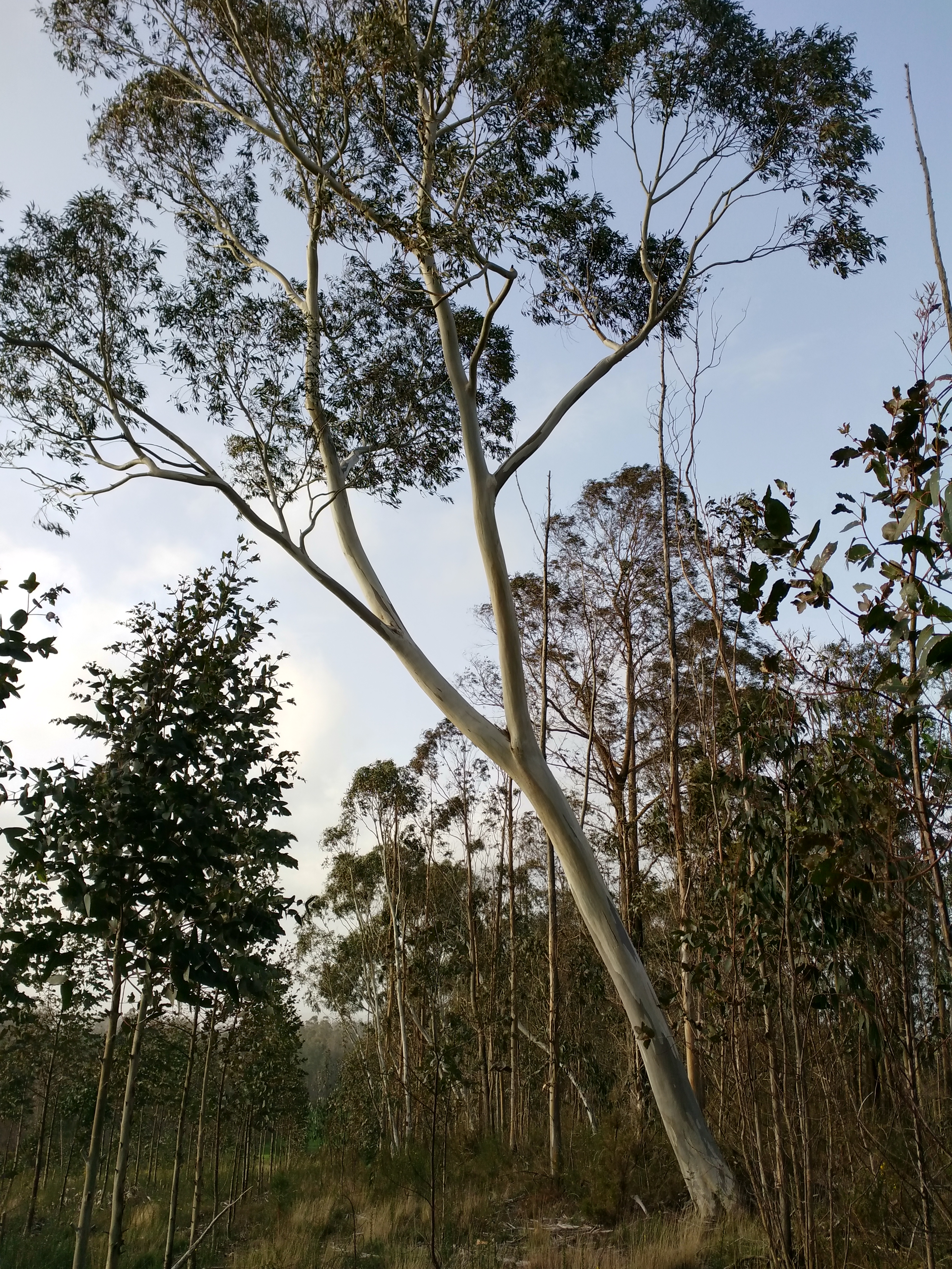 Un Eucalyptus pauciflora en La Baña (Galicia, España)